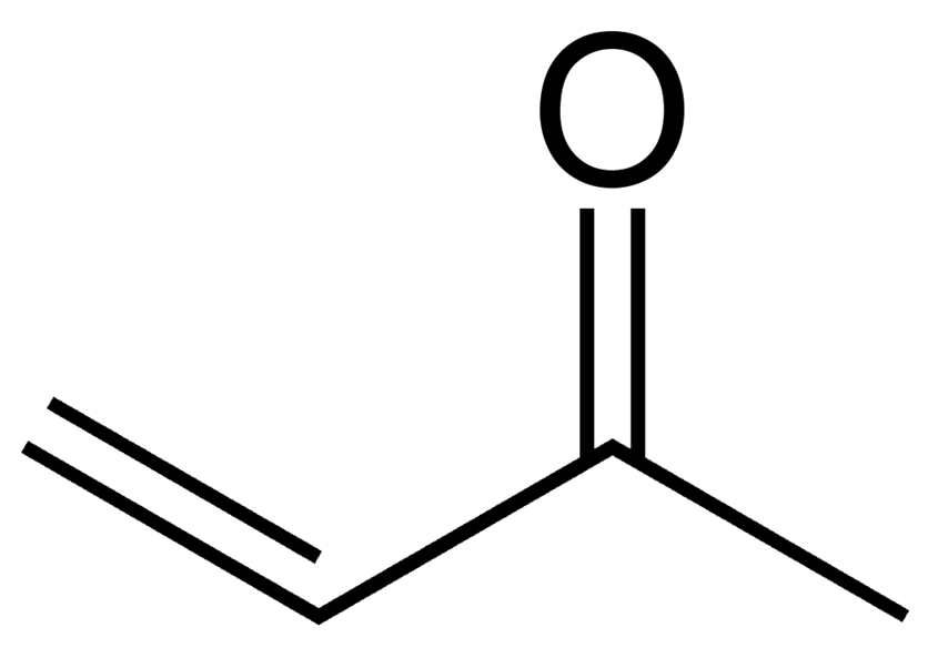 Butenon